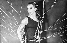 מתוך היצירה "נבכי הלב", 1966; כוריאוגרפיה: מרתה גרהם, סט: איסמו נוגוצ'י (באדיבות להקת מחול בת-שבע)